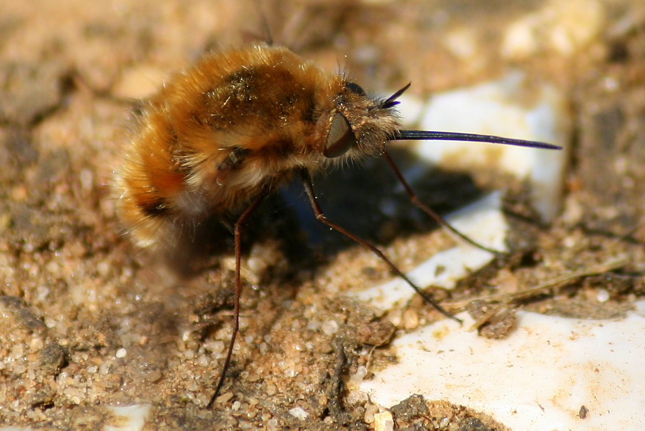 Bombylius major